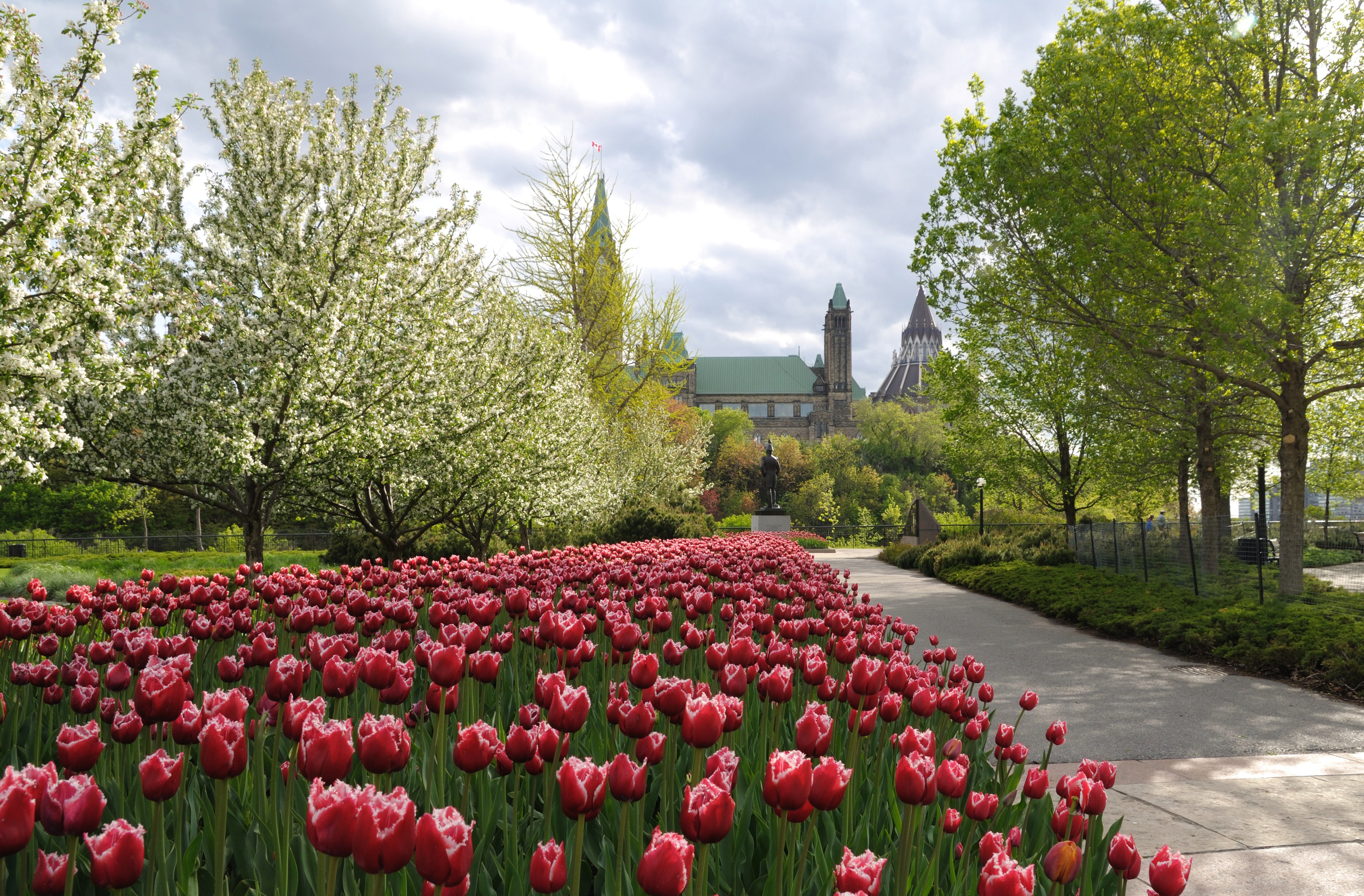 Ottawa: Tulpen (vom Major's Hill Park in Richtung Parlament gesehen)